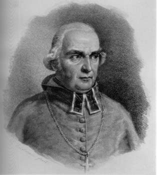 Der Theologe und Numismatiker Franz Ignaz von Streber (1758-1841)